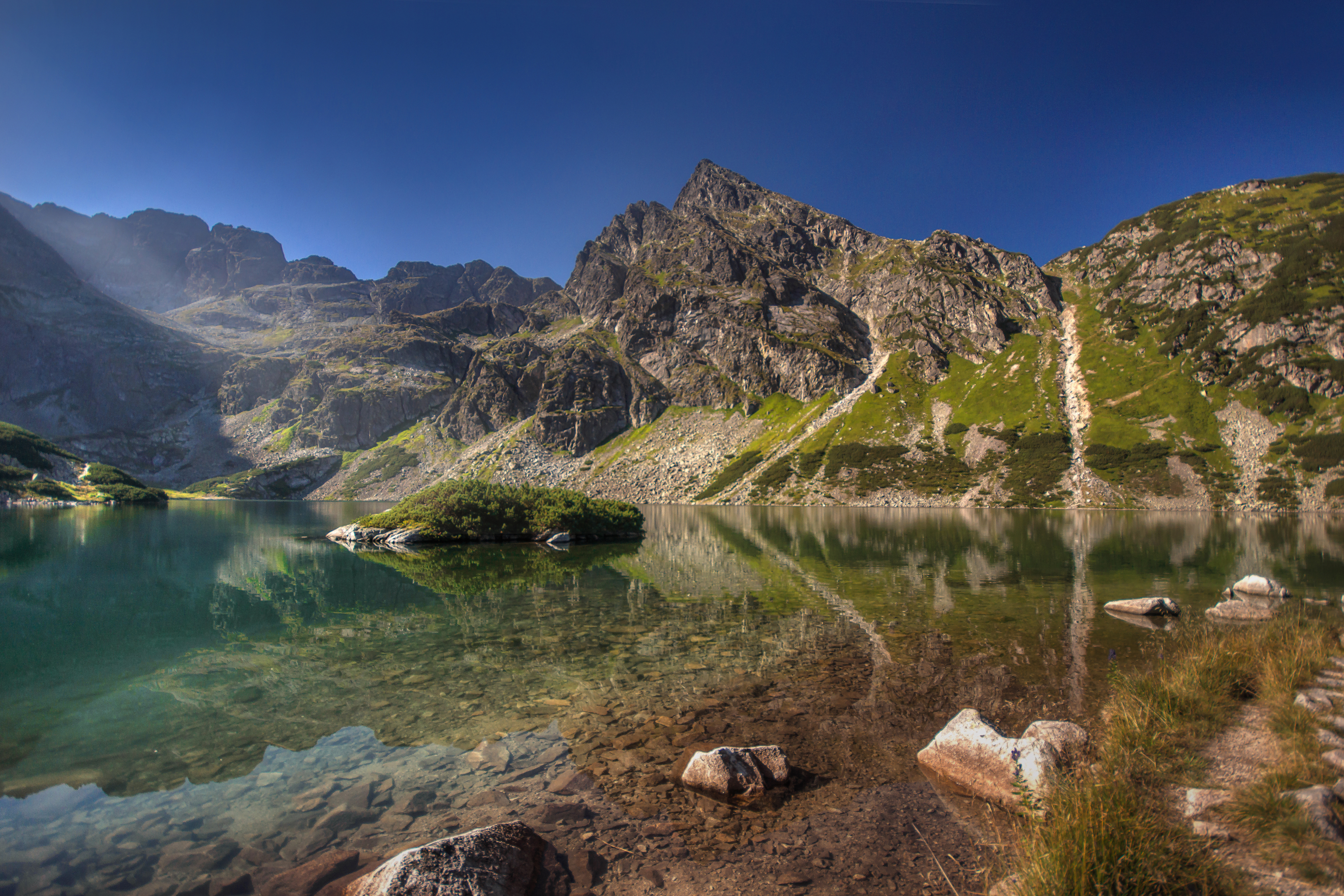 Obszar specjalnej ochrony ptaków: Tatry Czarny Staw widok na Kościelec This is a photography of protected area with CRFOP ID PL.ZIPOP.1393.N2K.PLC120001.B